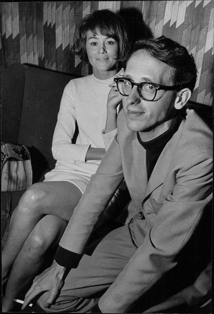 Bild tagen i samband med filmen Puss & kram (1967). Bildtext i Svenska Dagbladet 1967-06-21 (sid 16): "Agneta Ekmanner och Jonas Cornell."